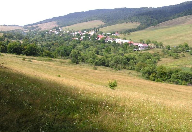 Celkový pohľad